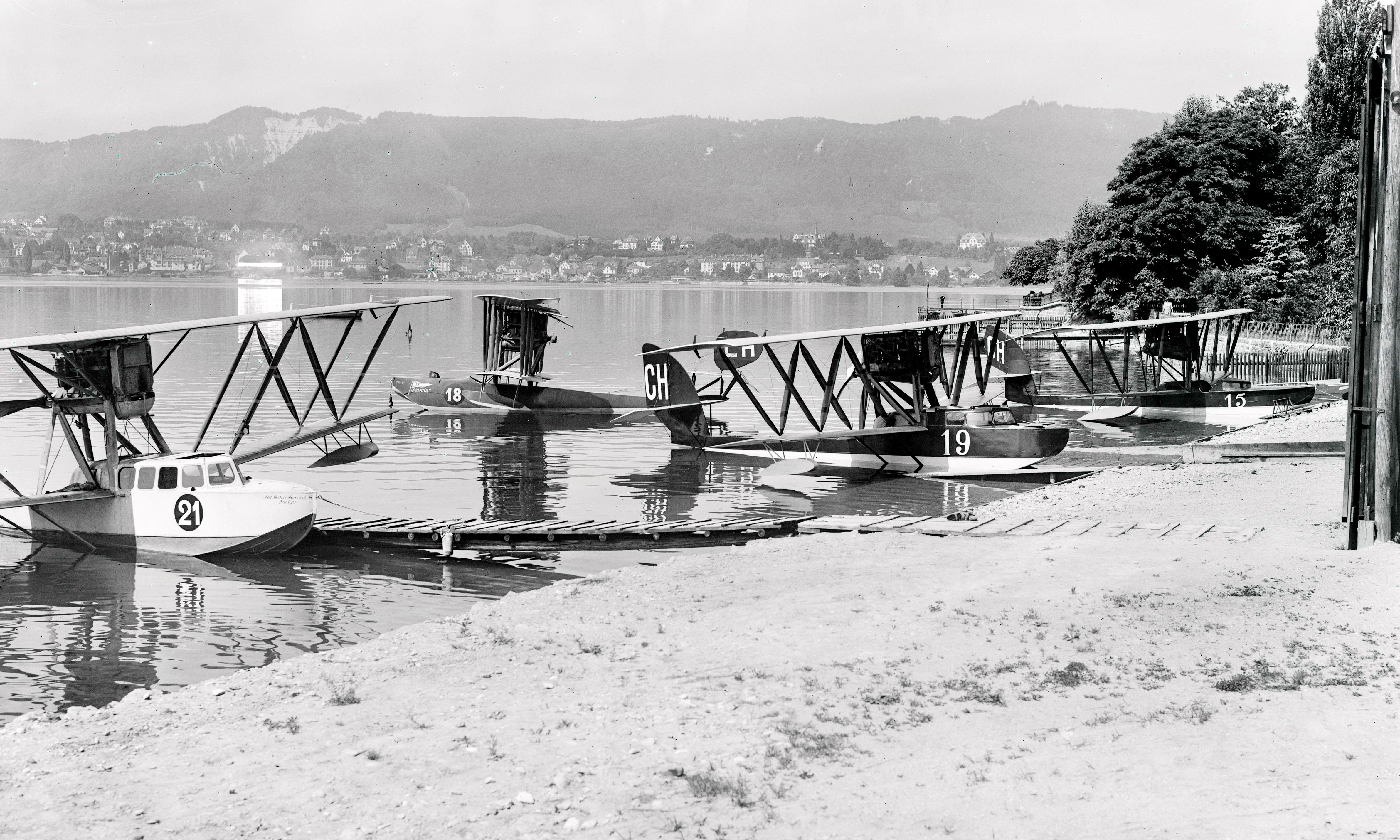 Flugboote der Ad Astra Aero S.A. beim Zürichhorn. Im Hintergrund: Wollishofen sowie die Albiskette mit Fallätsche (links) und Uetliberg (rechts). Das Savoia Flugboot CH-18 stürzte am 31. August 1920 in den Zürichsee ab. An den Stegen liegen Macchi M.18 (CH-21), Macchi M.9 (CH-19), Macchi M.3 ist die CH-15